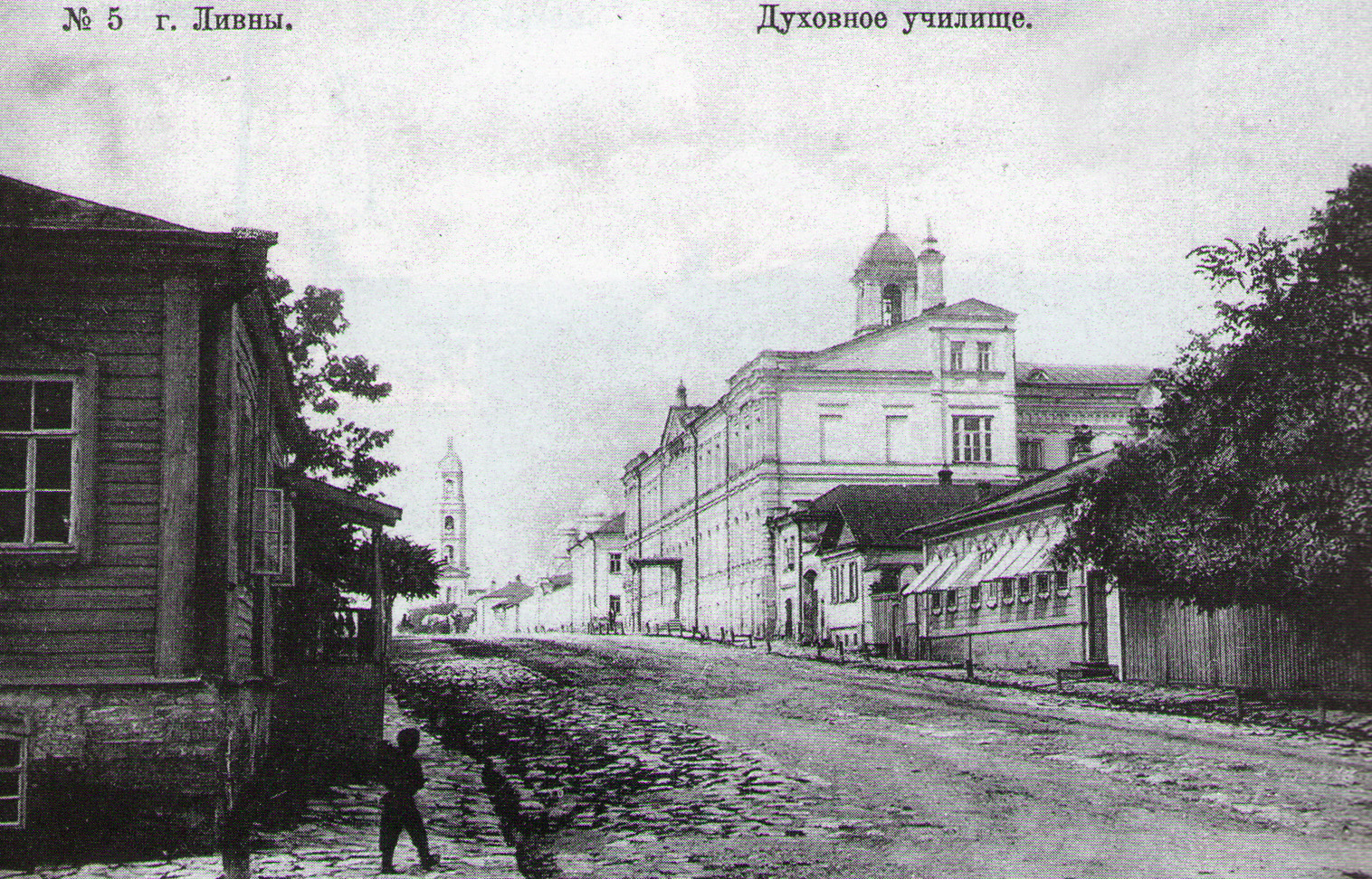 Лицей имени Булгакова на открытке из коллекции В. Артомонова